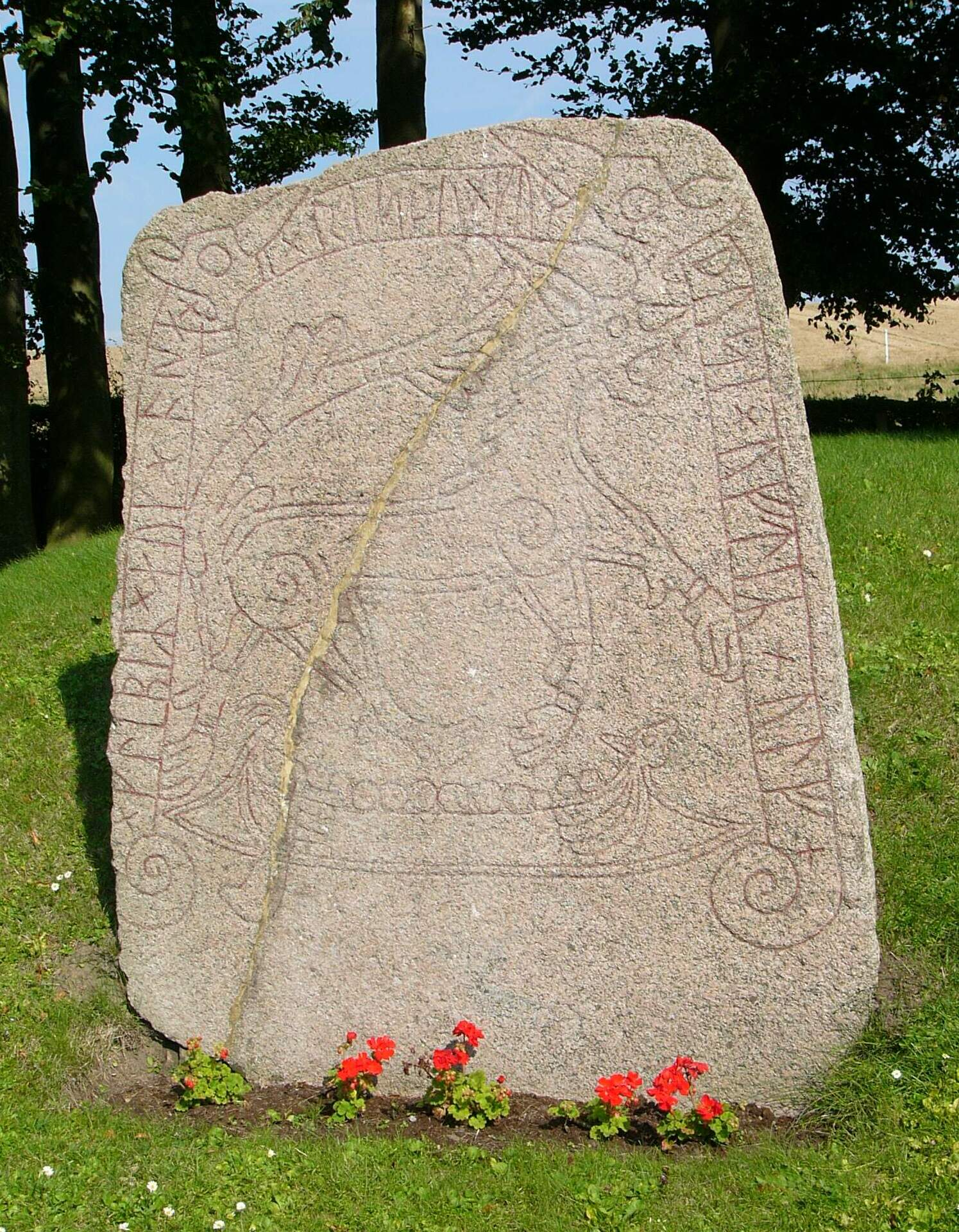 Tullstorp Runestone DR 271